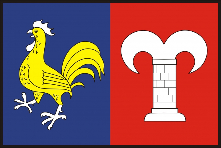 vlajka,Petrovice , okres Třebíč